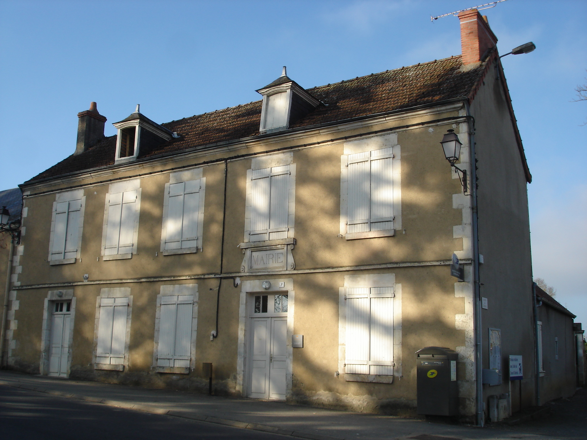 Saint-Chartier (36) : La mairie.